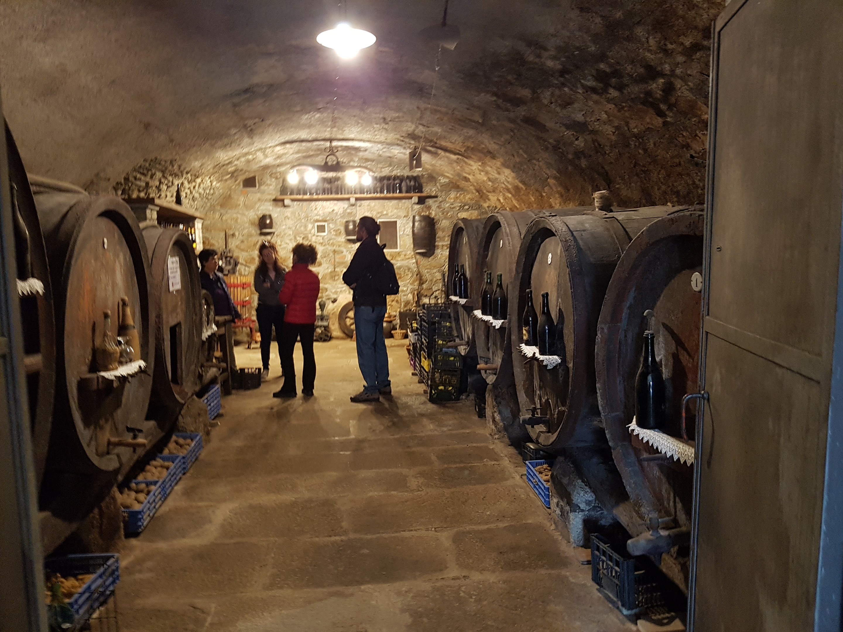 Balmetto, Borgofranco d'Ivrea, Piemonte